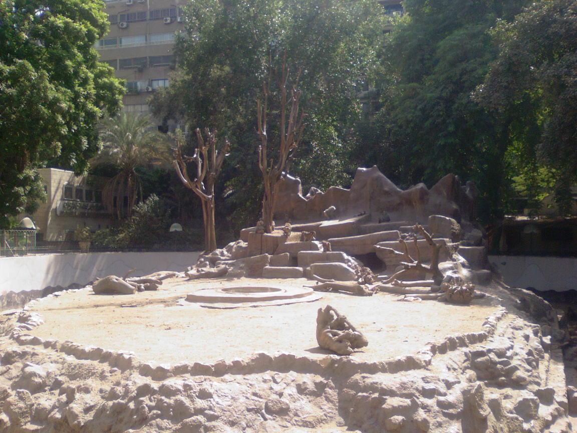 جبلاية القرود بحديقة الحيوانات بالجيزة